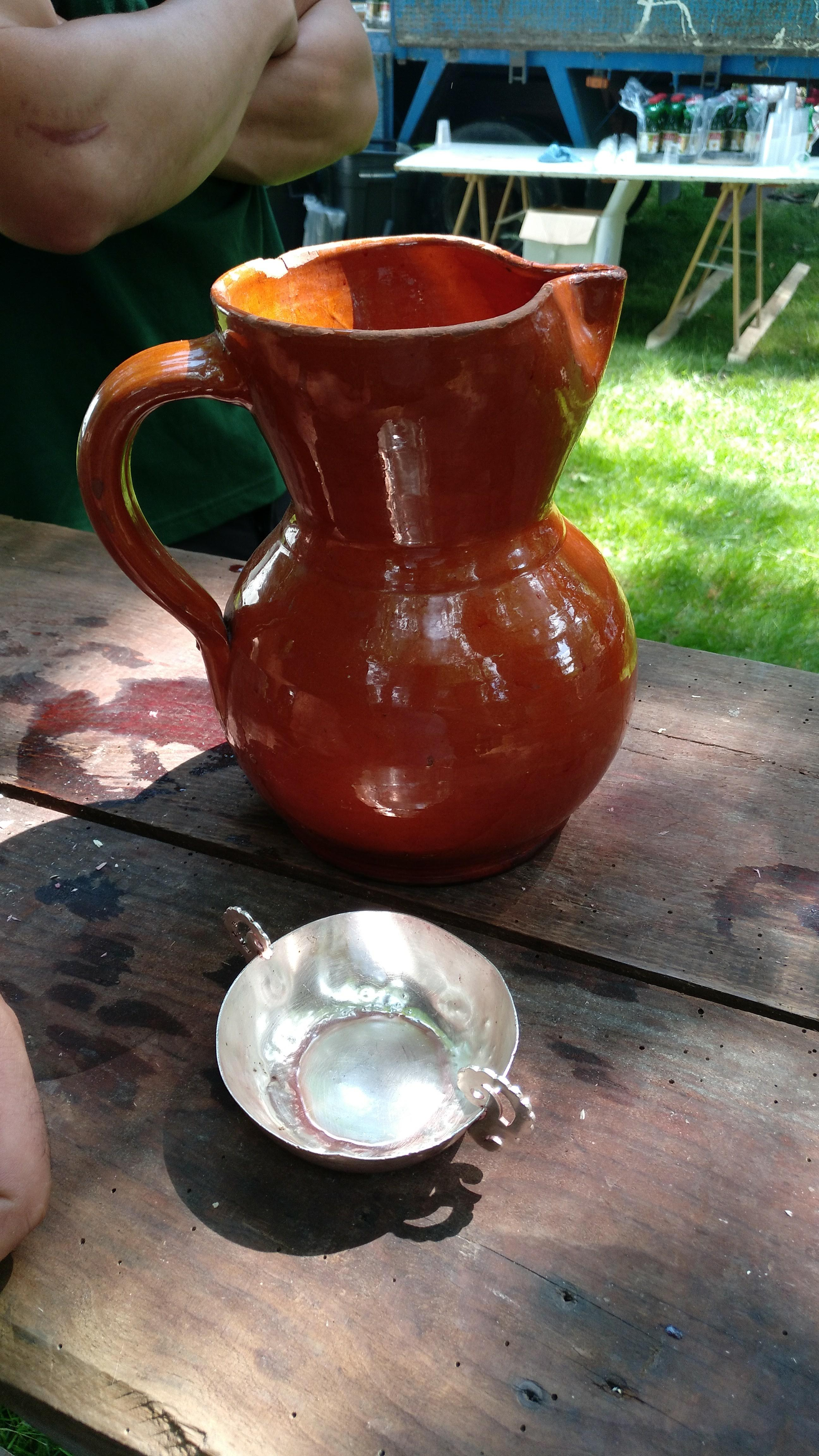 Ardoa ateratzeko pitxarra eta zilarrezko barkilla (Altsasun, tazika), San Pedro egunean.